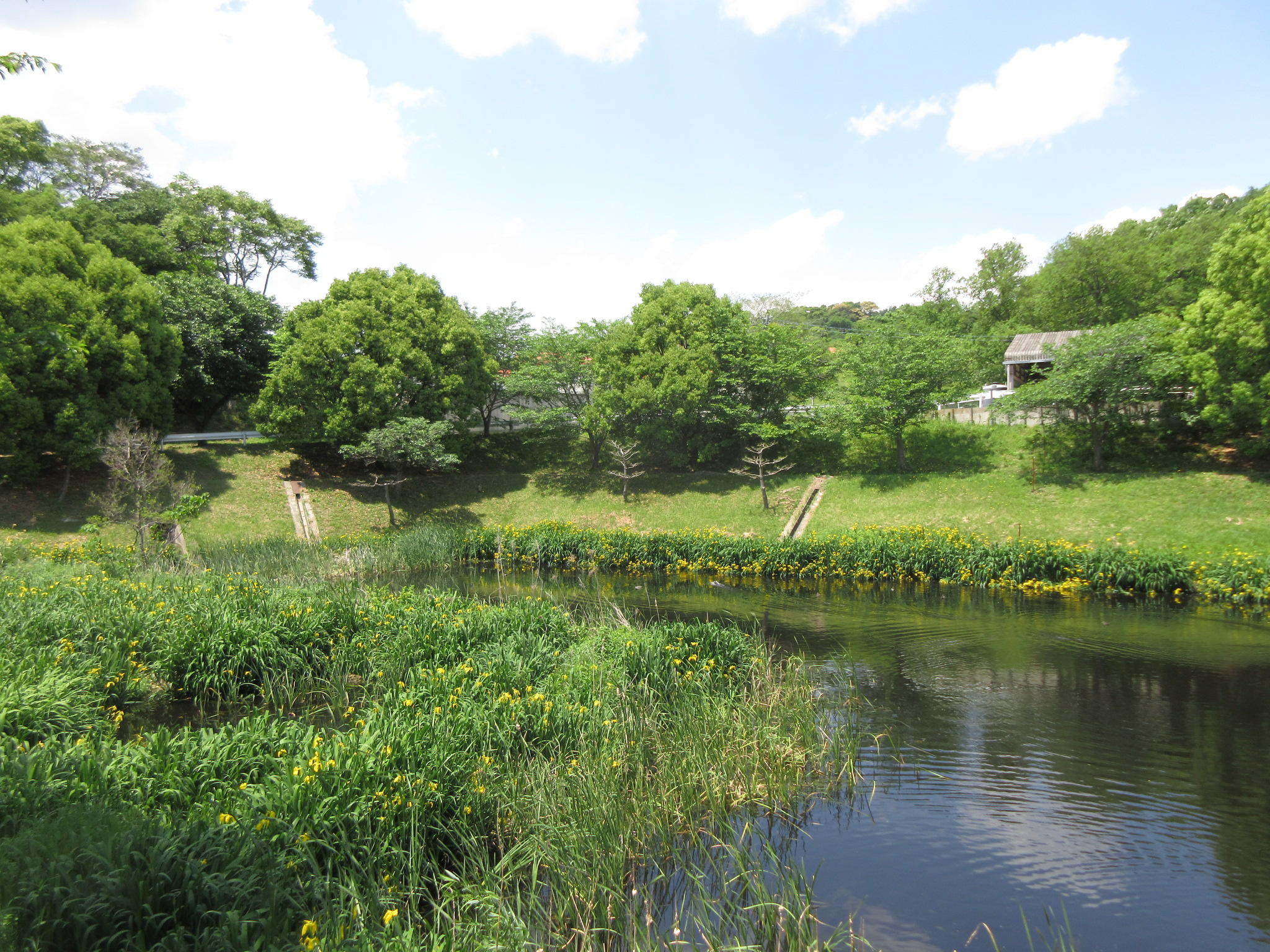 愛知県畜産総合センター（愛知県岡崎市）